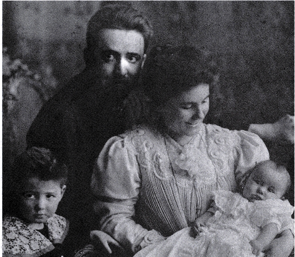 z